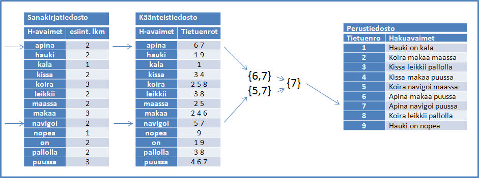 Kuvaaja hausta käänteistiedostorakenteessa. Esimerkit ovat keksittyjä.